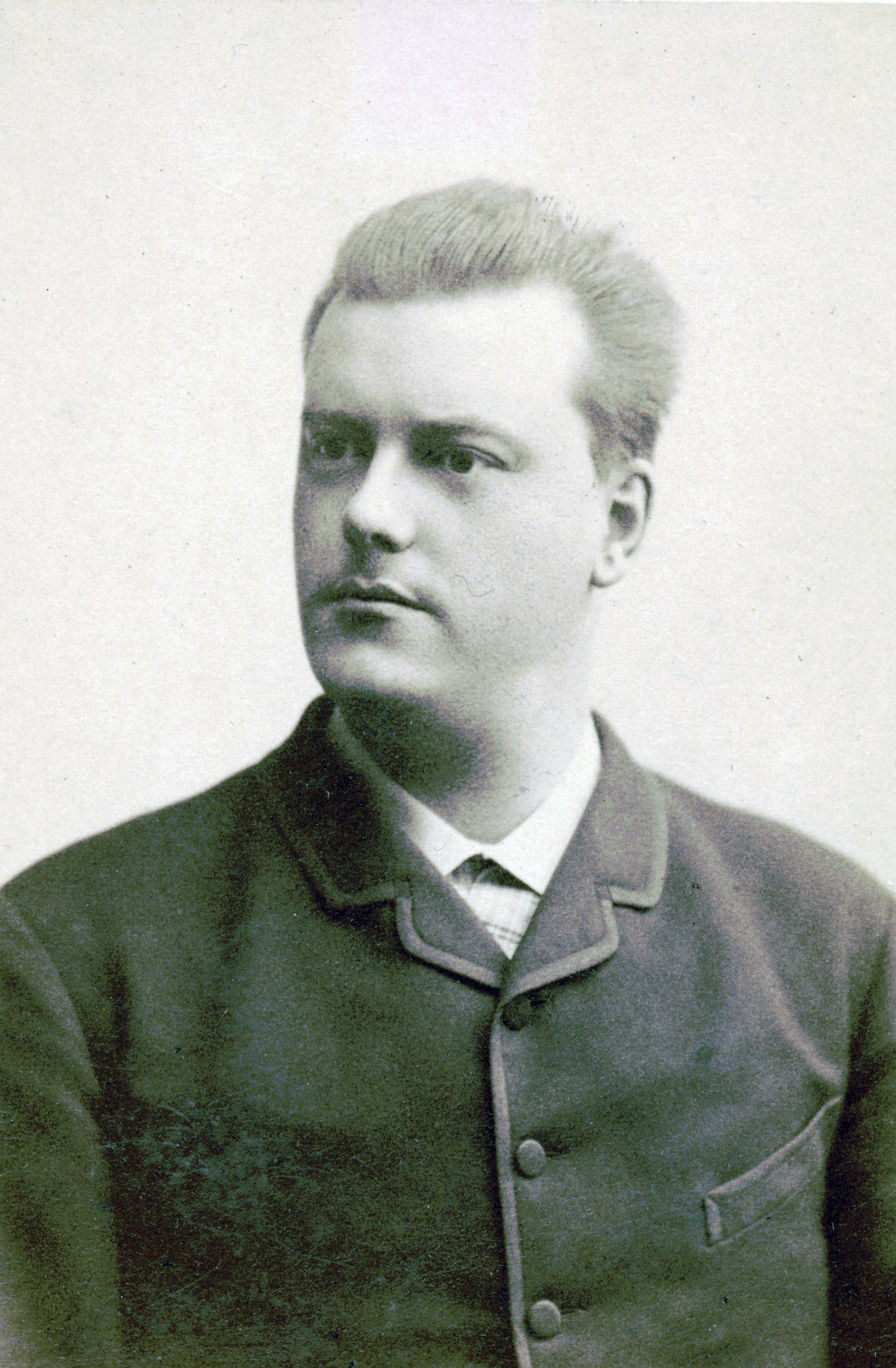 Gustaf Ranft, skådespelare vid Albert Ranfts sällskap 1884